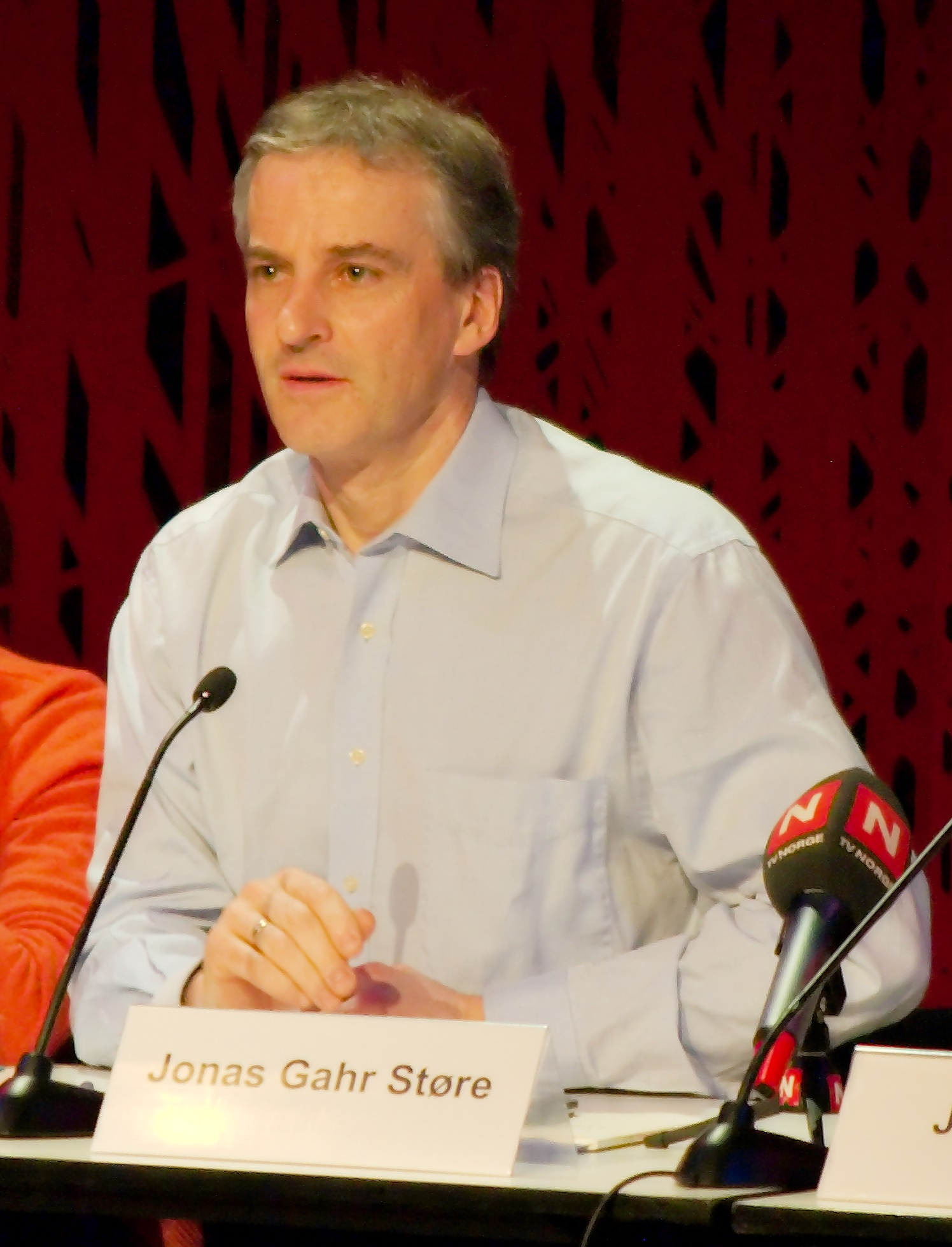 Dialogmøte om hat på Litteraturhuset i Oslo. Jonas Gahr Støre .